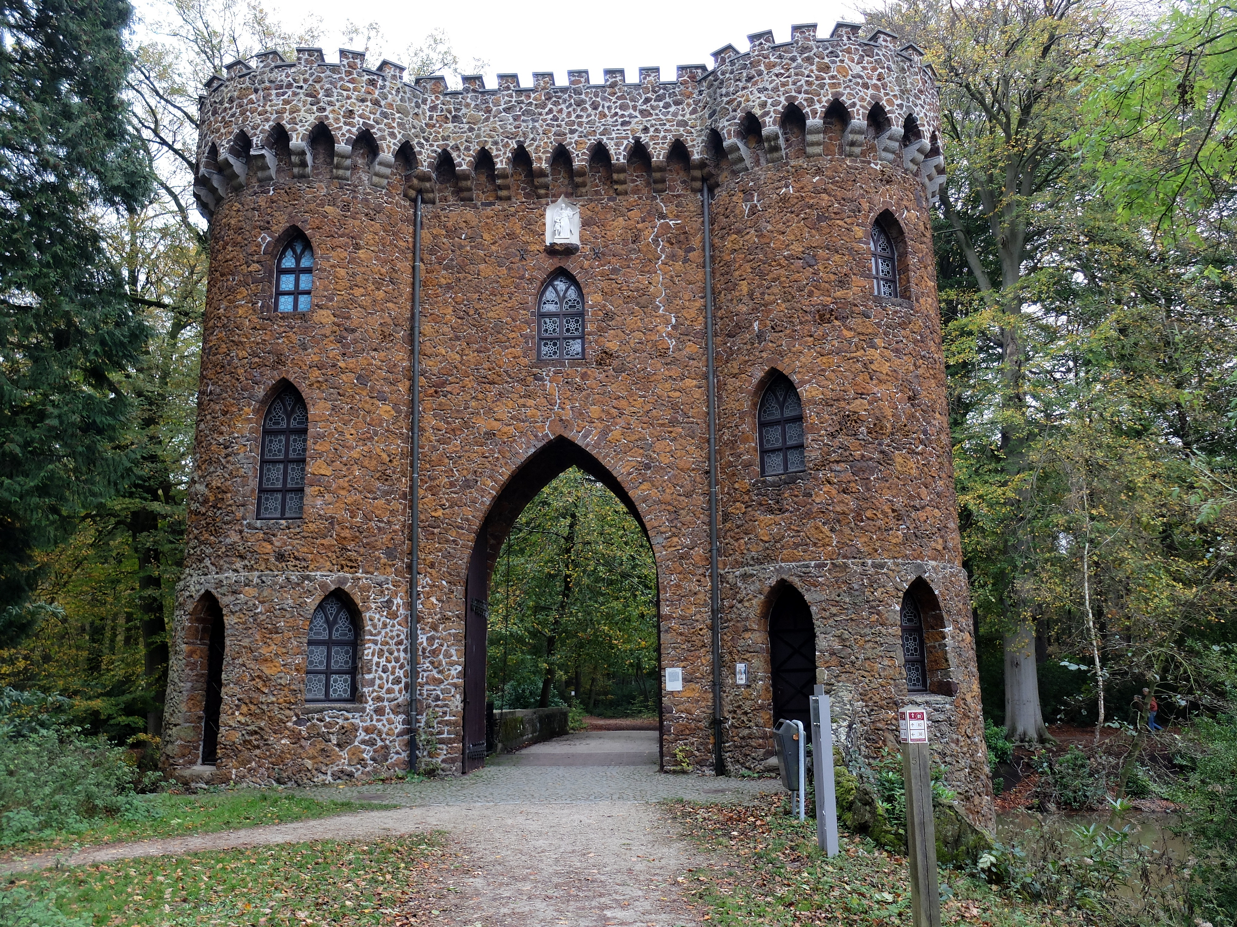 Torenpoort De Mik in Brasschaat